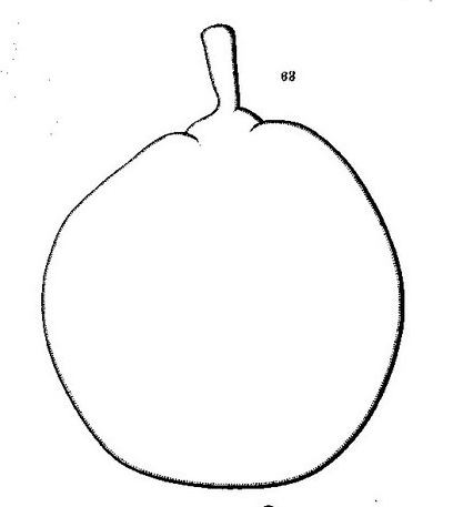 Beurré Dumont, Dict. de pomologie, 1863, A. Leroy.